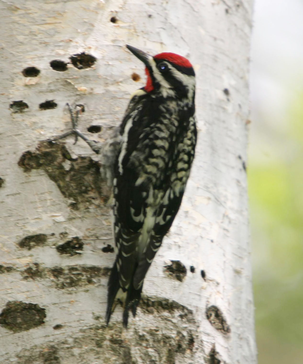 Sphyrapicus varius